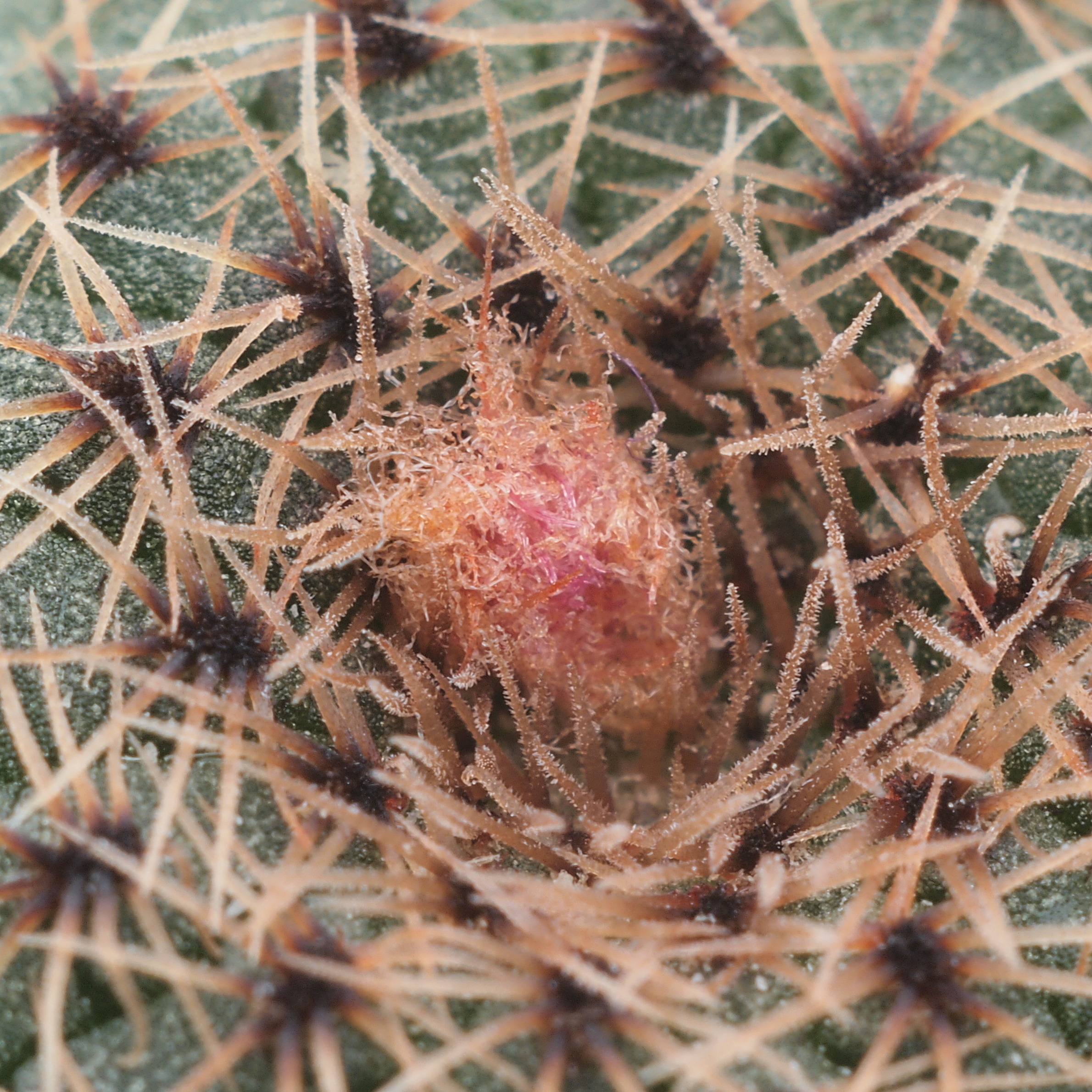 Aussaat: Februar 2013 - Knospe am 1-jährigen Sämling???